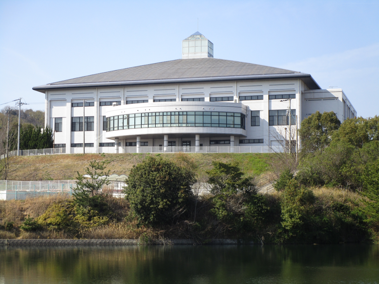 三豊市総合体育館（池側より撮影）